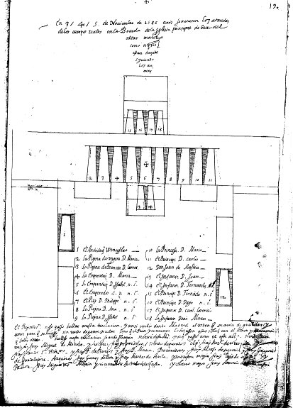 Manuscrito de las «Memorias» de Juan de San Jerónimo con la disposición de los ataúdes en la "Boueda de la yglessia principal debaxo del altar mayor". La cruz bajo el altar es el ataud de Carlos V, según marcó en su testamento. A sus lados, la emperatriz Dª María y Felipe II; enfrente los infantes, y relegado abajo a la derecha, don Juan de Austria.